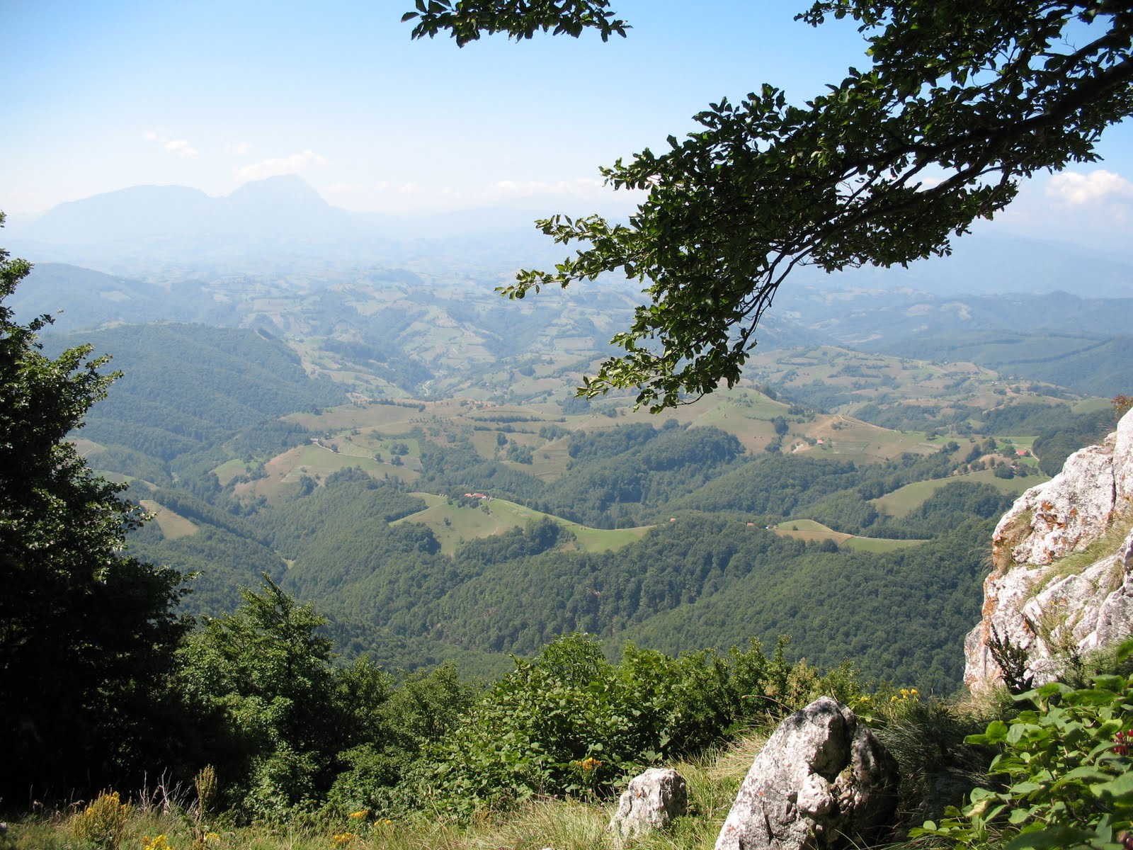 Ansicht vom Zeidner Berg, auf die Ortschaft Holbav, Kreis Braşov, Rumänien.